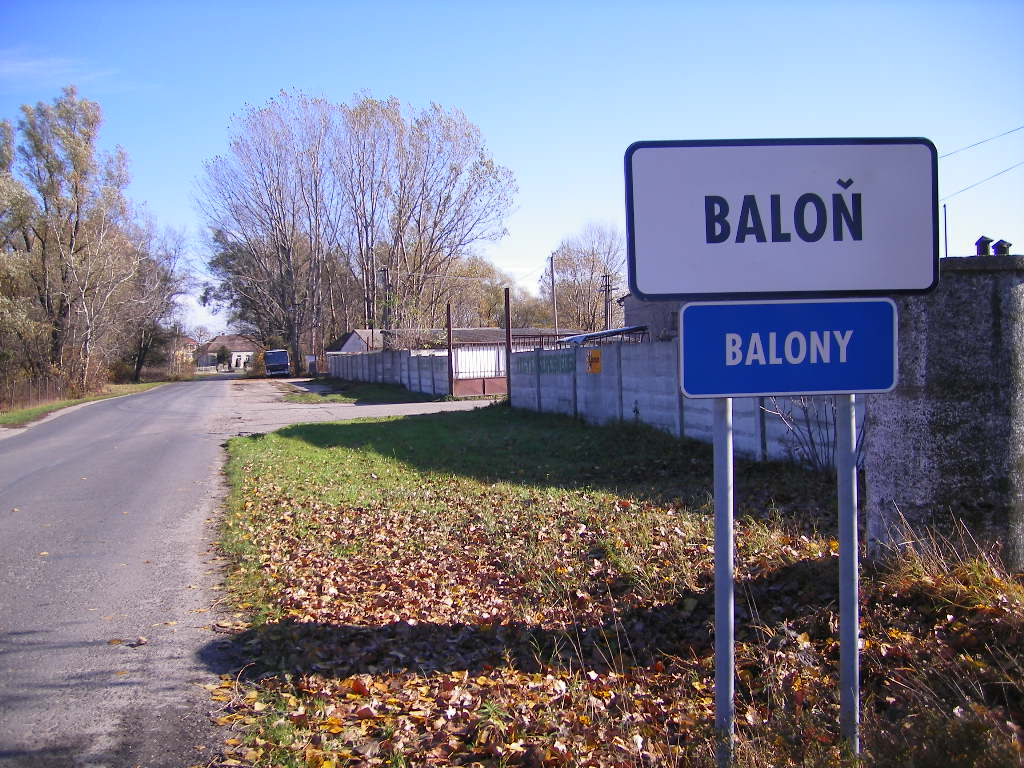 Balony